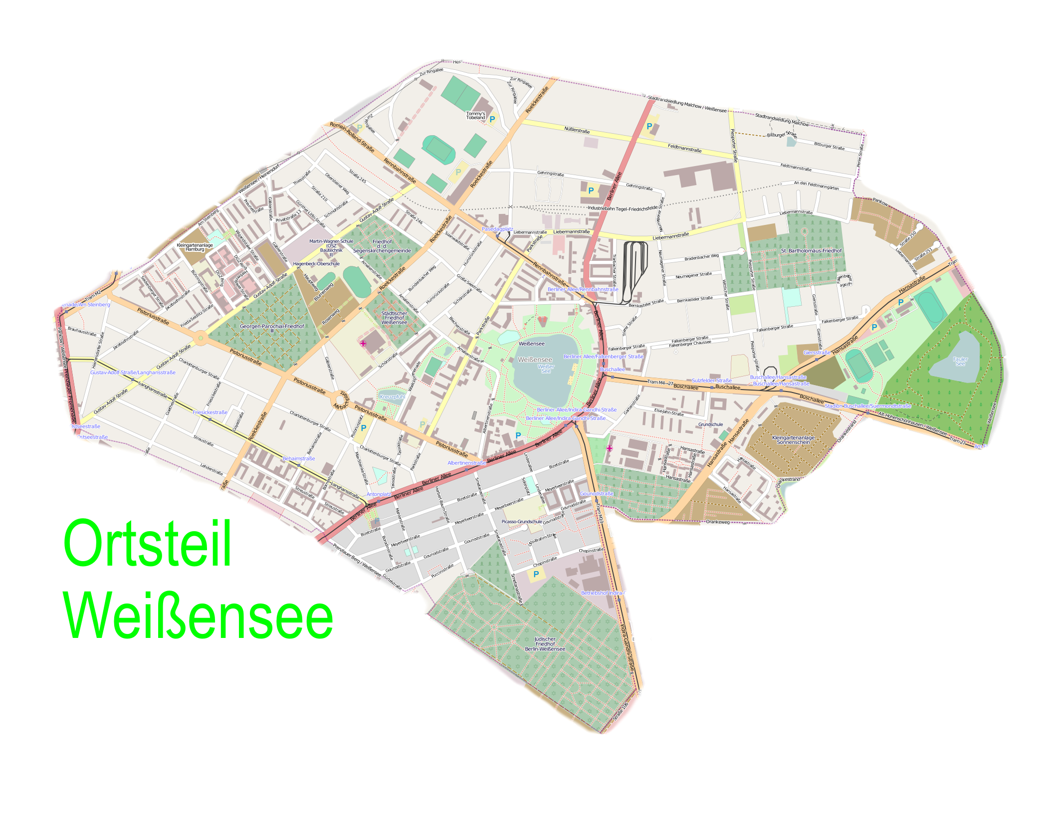 Karte des Ortsteil Weißensee, nachbearbeitet aus Open Street Map